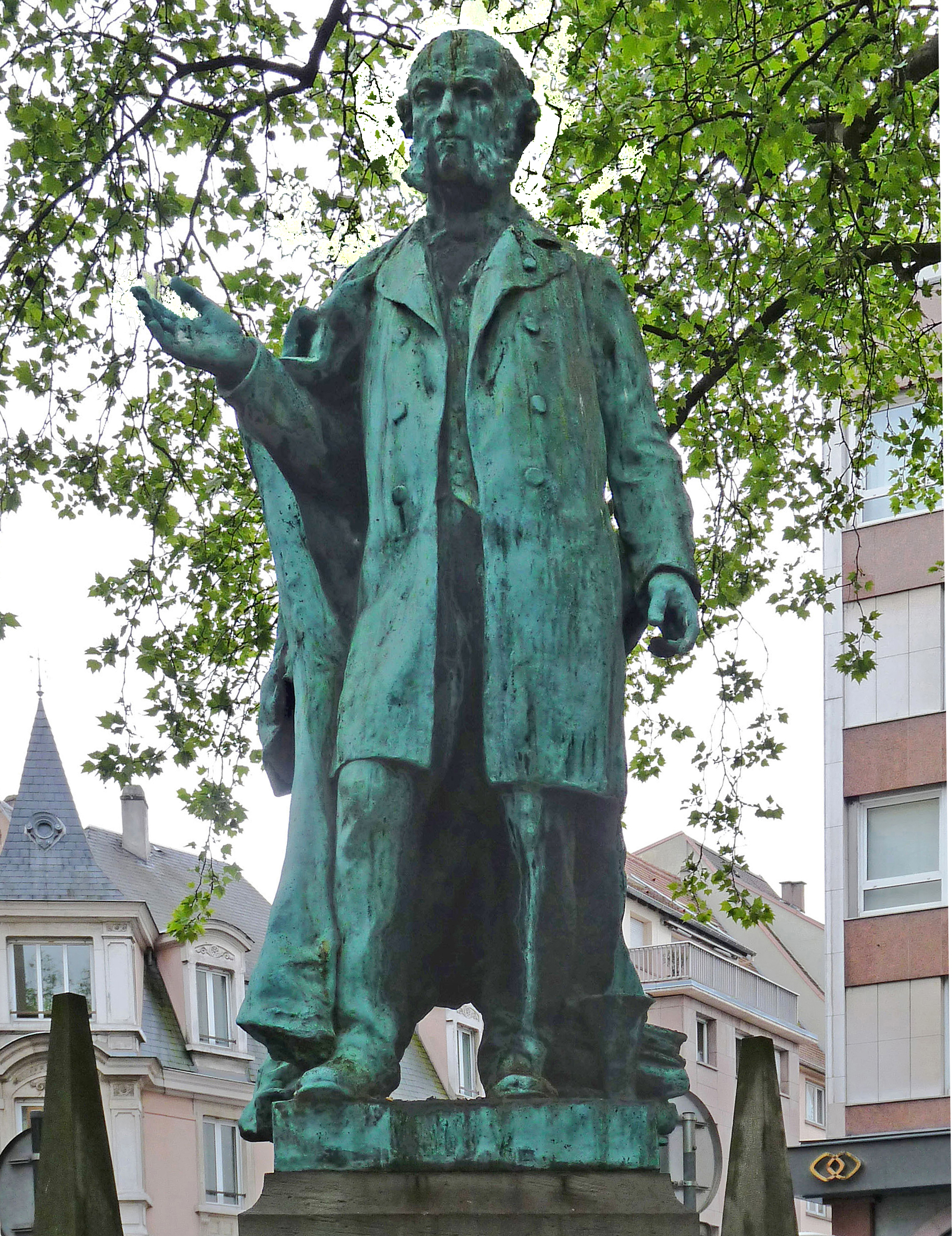 Wurtz-Denkmal in Straßburg